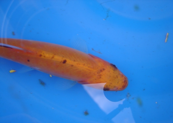 Goudzeelt